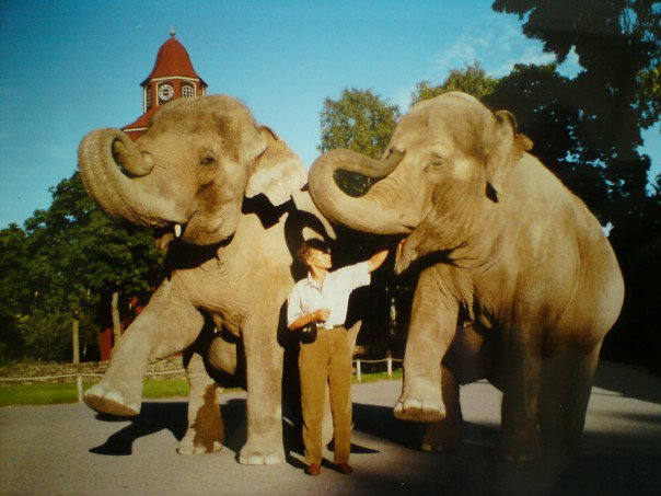 Skansens elefanter Nika och Shiva med Catharina Florman framför Seglora kyrka 1990